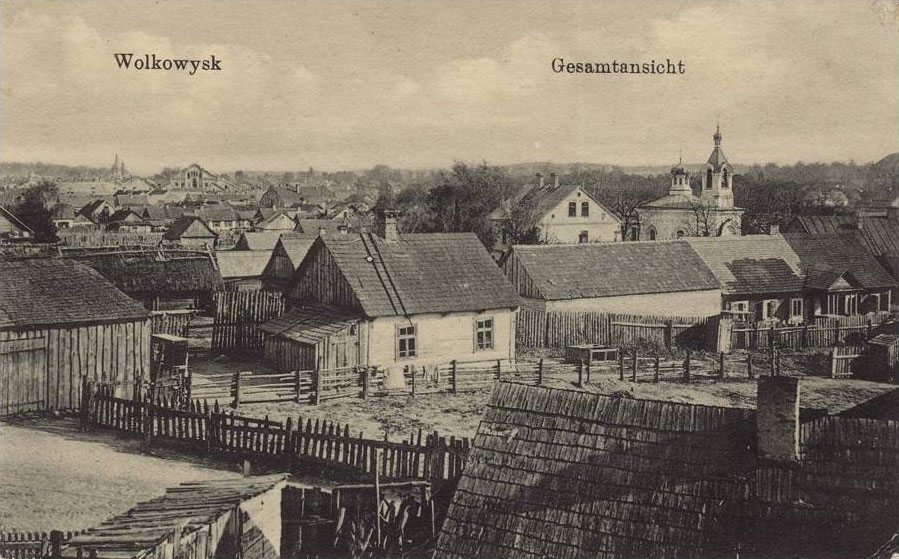 Беларуская (тарашкевіца): Ваўкавыск (Vaŭkavysk)